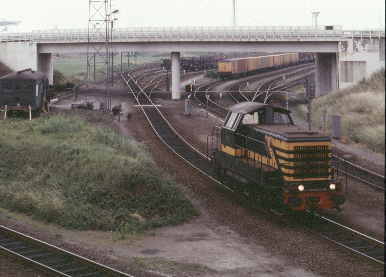 SNCB 8211 in Zeebrugge